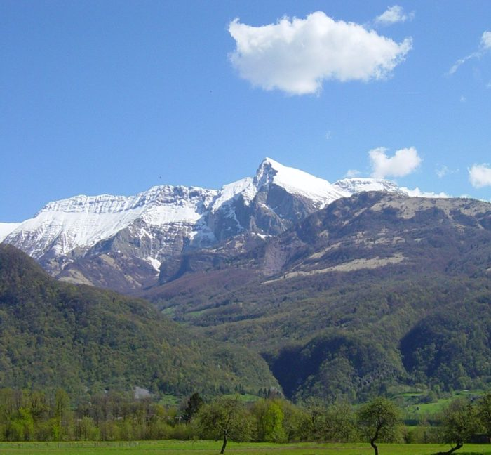 Krn z Idrskega